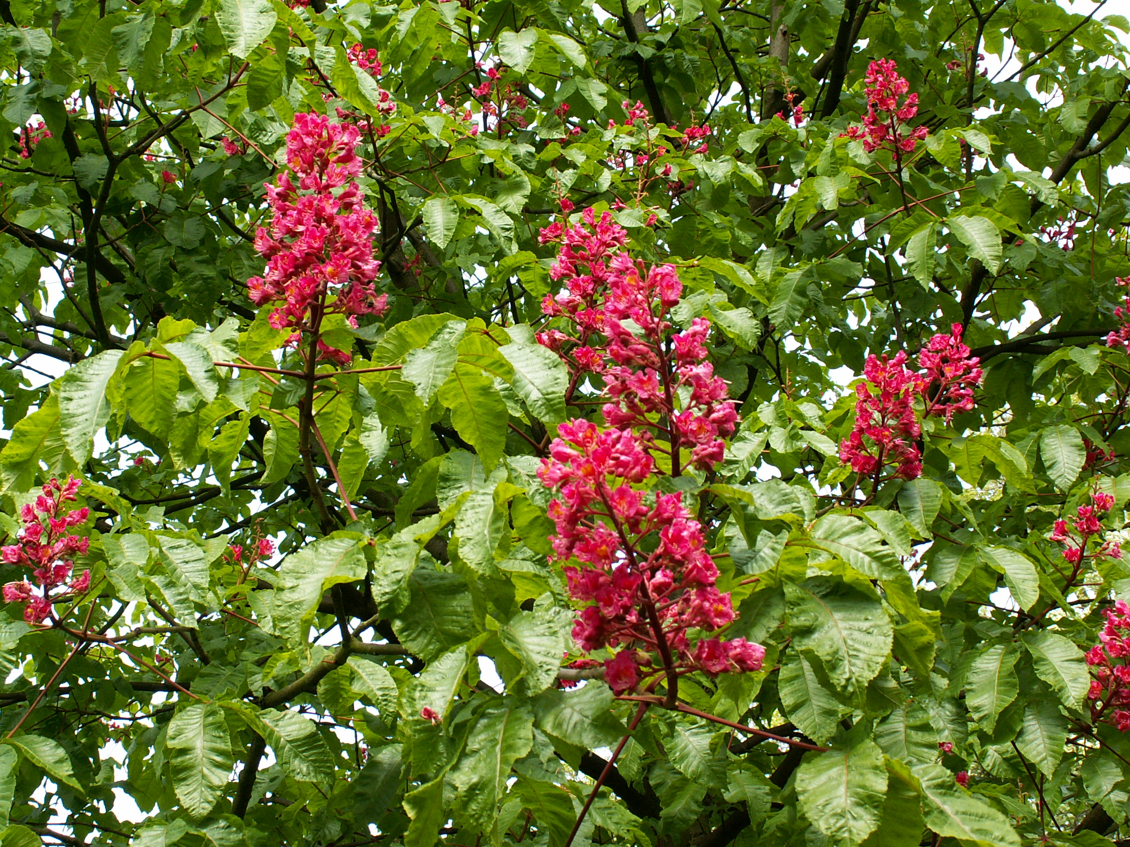 Aesculus x carnea; Kasztanowiec czerwony (pl); Fleischrote Rosskastanie (de)